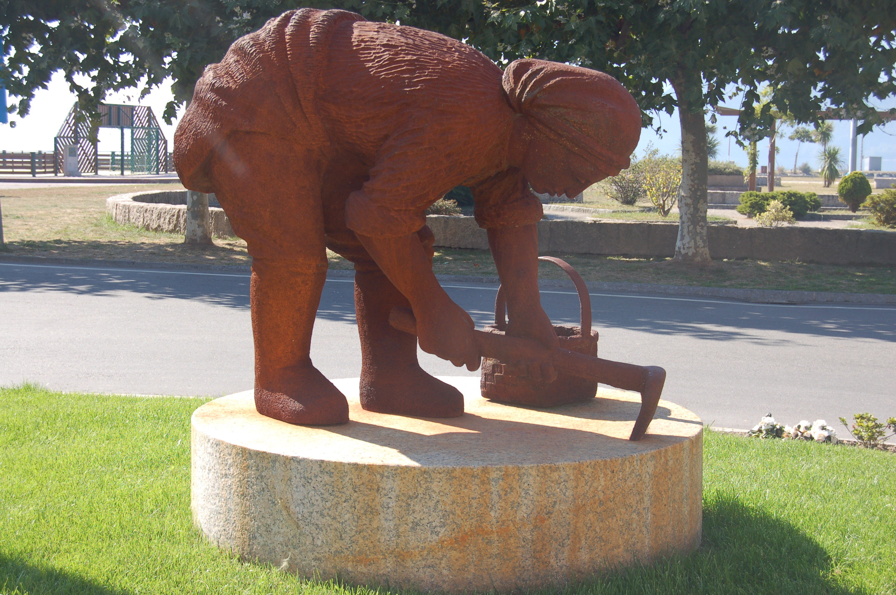 Estatua dunha mariscadora, obra de Carlos Tesouro, en Arcade (Soutomaior)